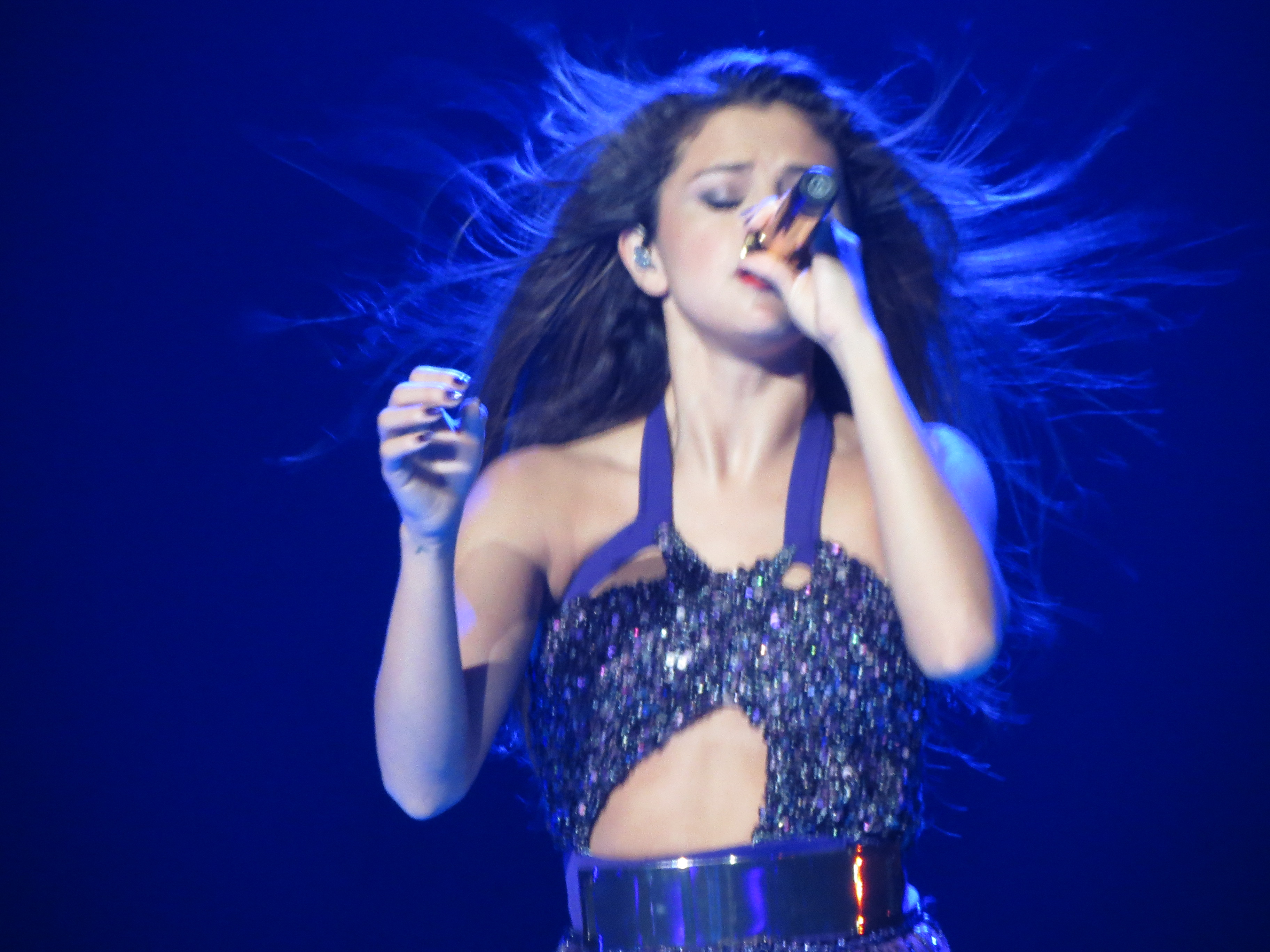 Selena Gomez StarsDance Nov 2013 San Diego, CA